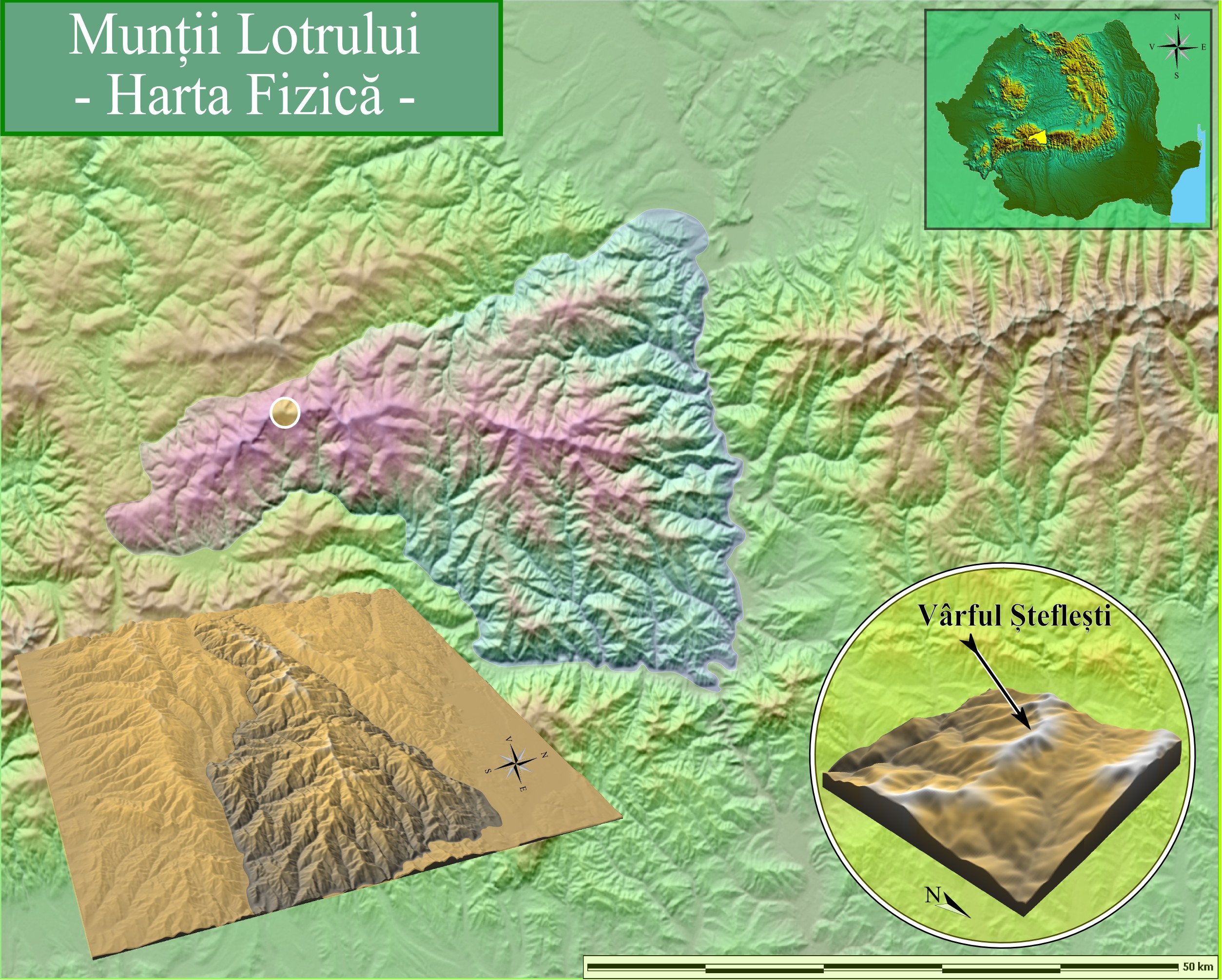 Munţii Lotrului, reprezentare fizică. Imaginea a fost creată după date SRTM furnizate liber de NASA